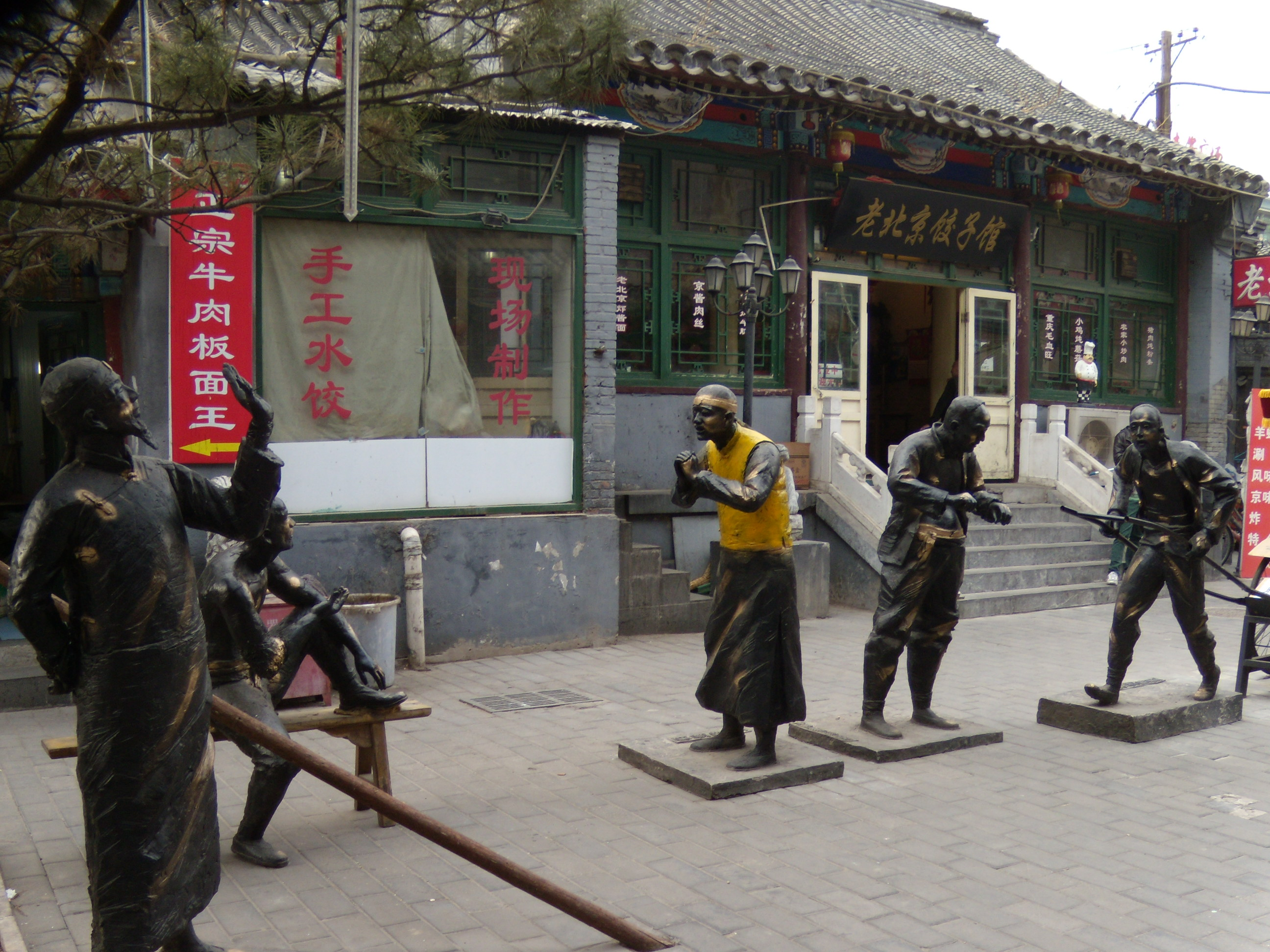 老北京风情街内广场上的雕塑